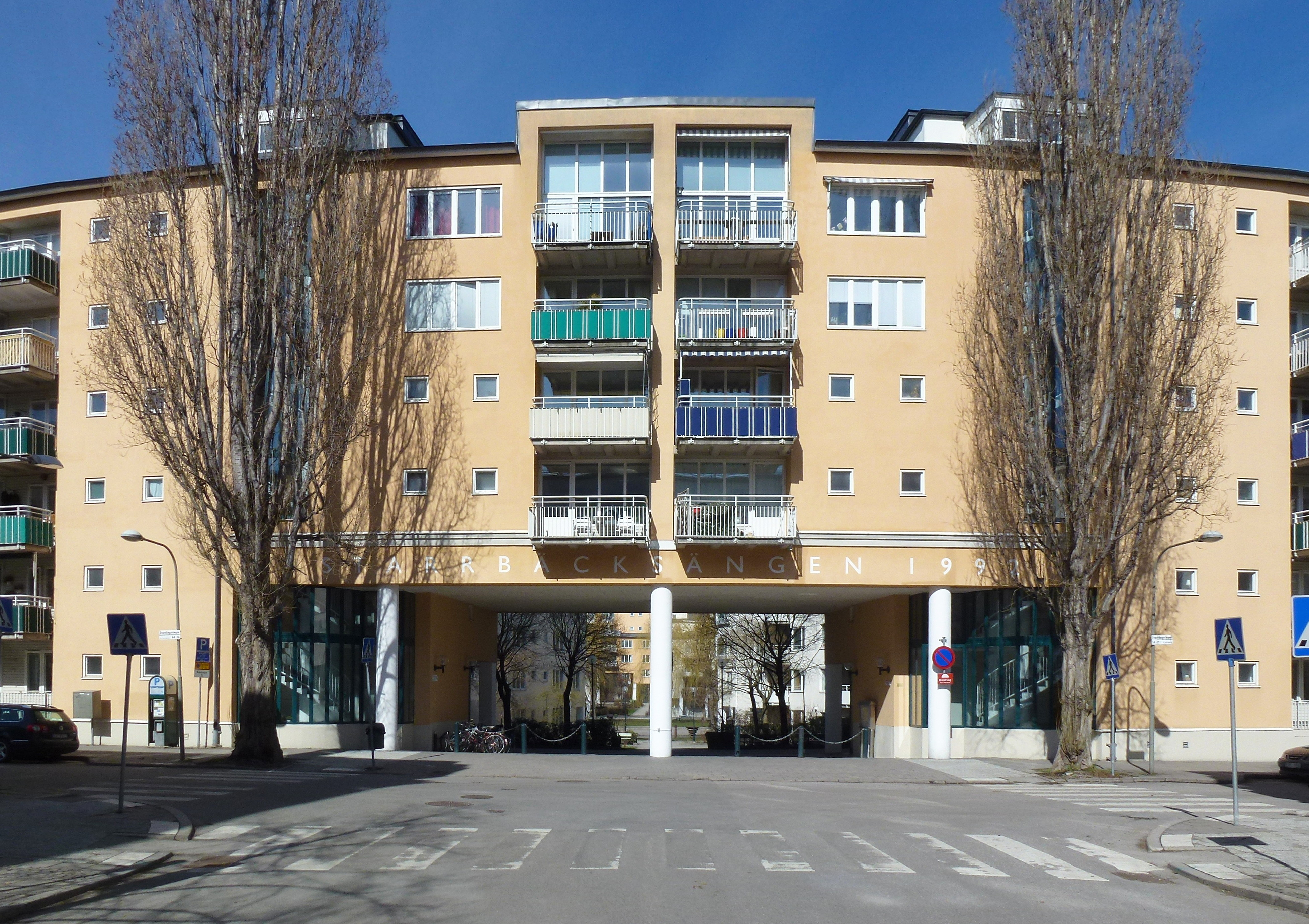 Starrbäcksängen, Gärdet, portalbyggnaden